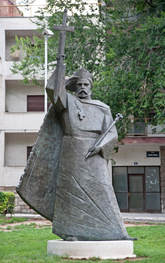 16. obljetnica vojnoredarstvene operacije Oluja